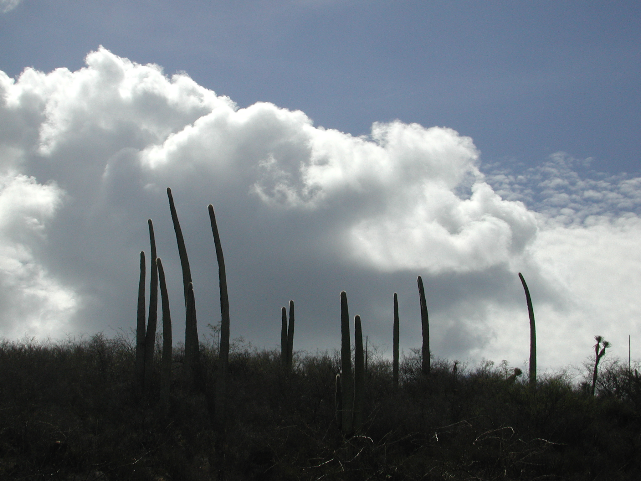 Cephalocereus columna-trajani, also C. hoppenstedtii. Near Tehuacán, Puebla state, México